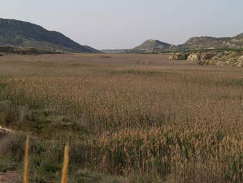 Carrizal de la cola del pantano de Elche en término municipal de Aspe (Alicante)